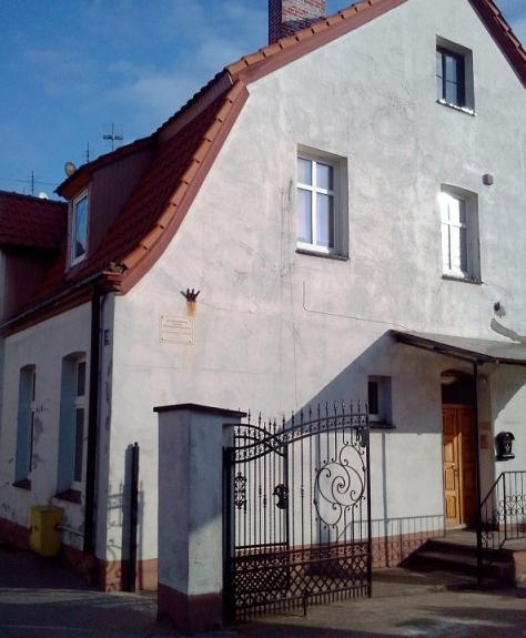 Parafia rzymsko-katolicka w Łobzie